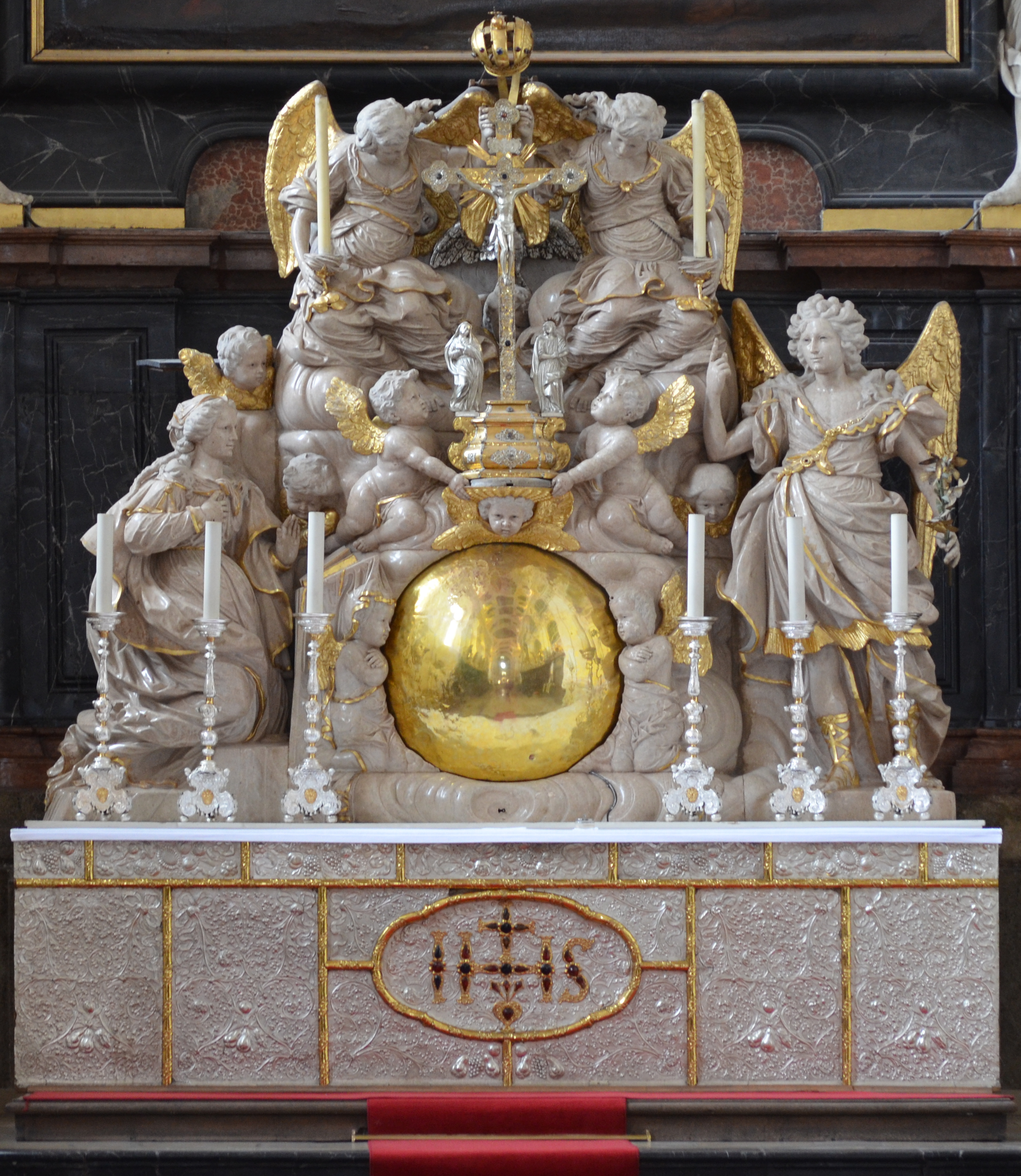 Waldsassen (Bavière-Allemagne - abbatiale (devenue basilique) de l'abbaye cistercienne.